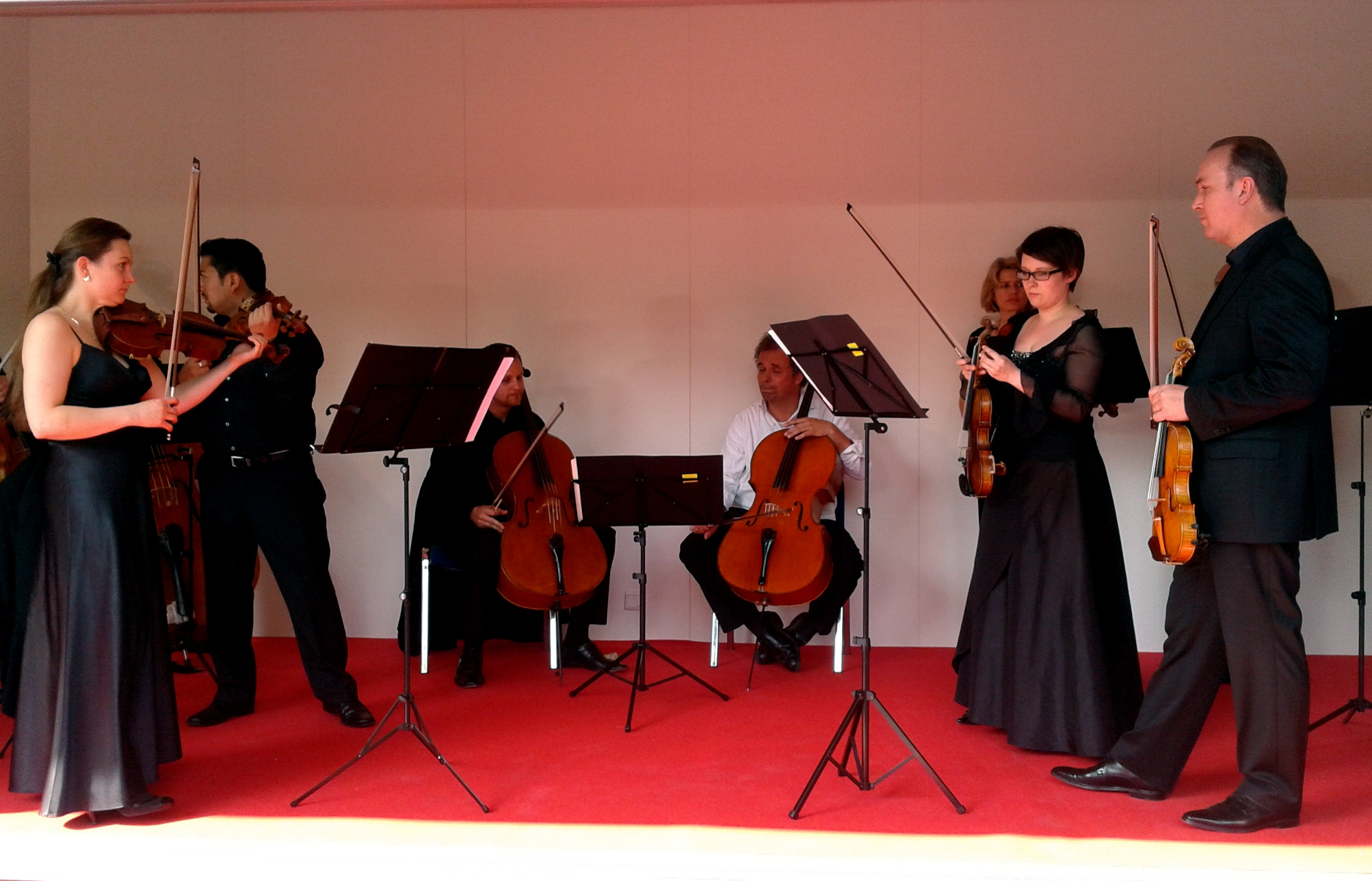 Ein Teil des Kurpfälzischen Kammerorchesters bei der Veranstaltung "Tüten und Töne" im geöffneten Schaufenster vom Kaufhof P1 in Mannheim